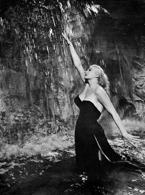 Anita Ekberg. Fotogramma da La dolce vita.